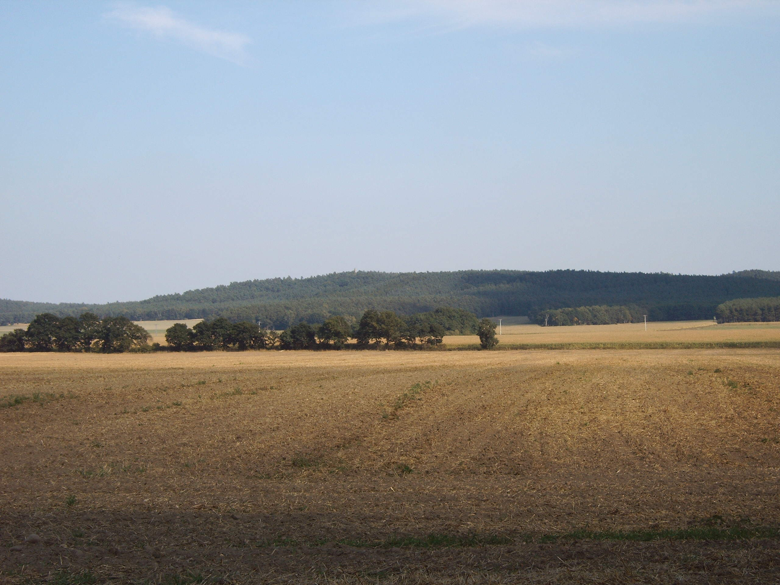 Hellberge, Blick von der Straße Breitenfeld (Altmark)-Schwiesau